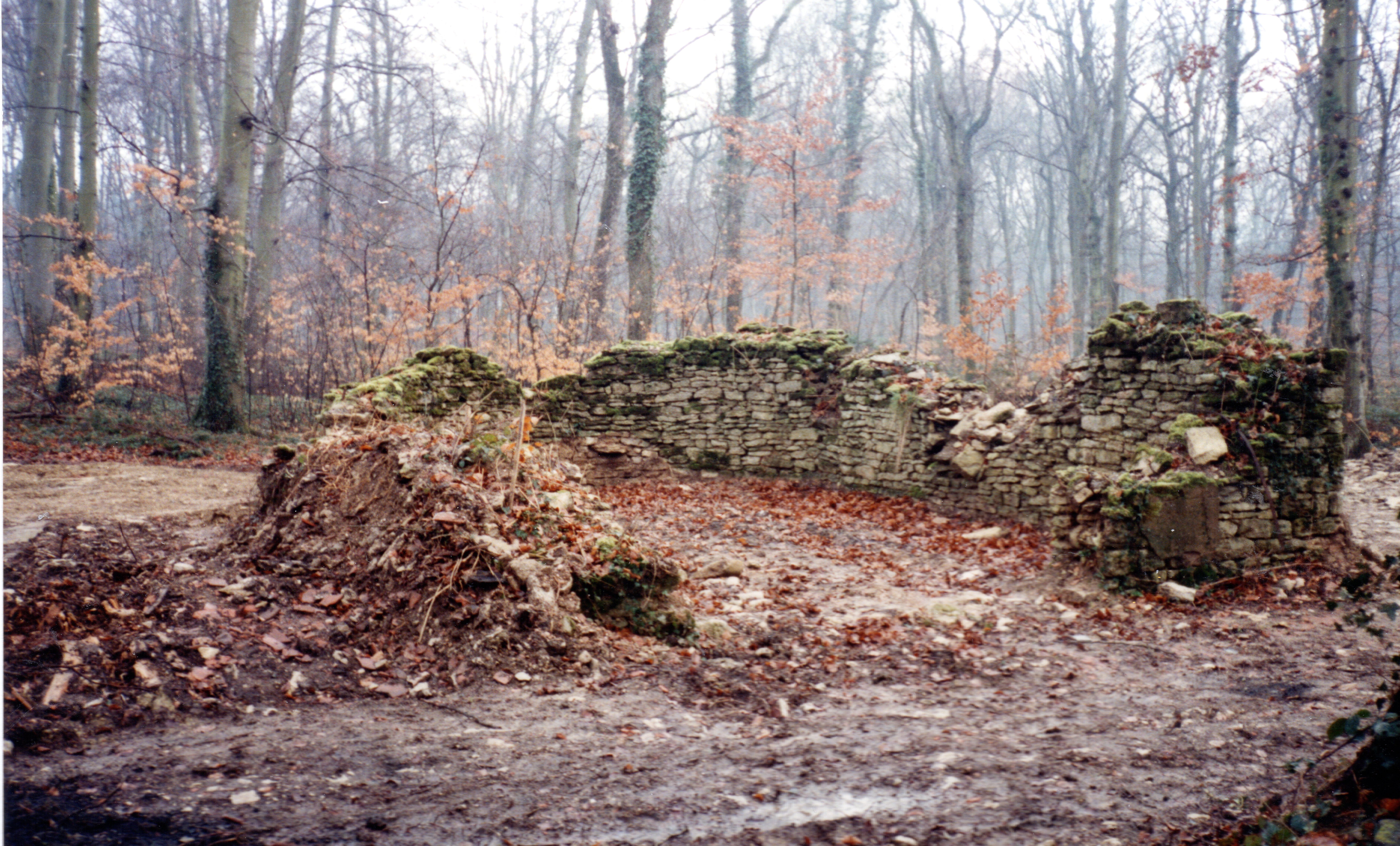 Finalisation des recherches archéologiques et découverte des ruines de la chapelle de Pontpierre.